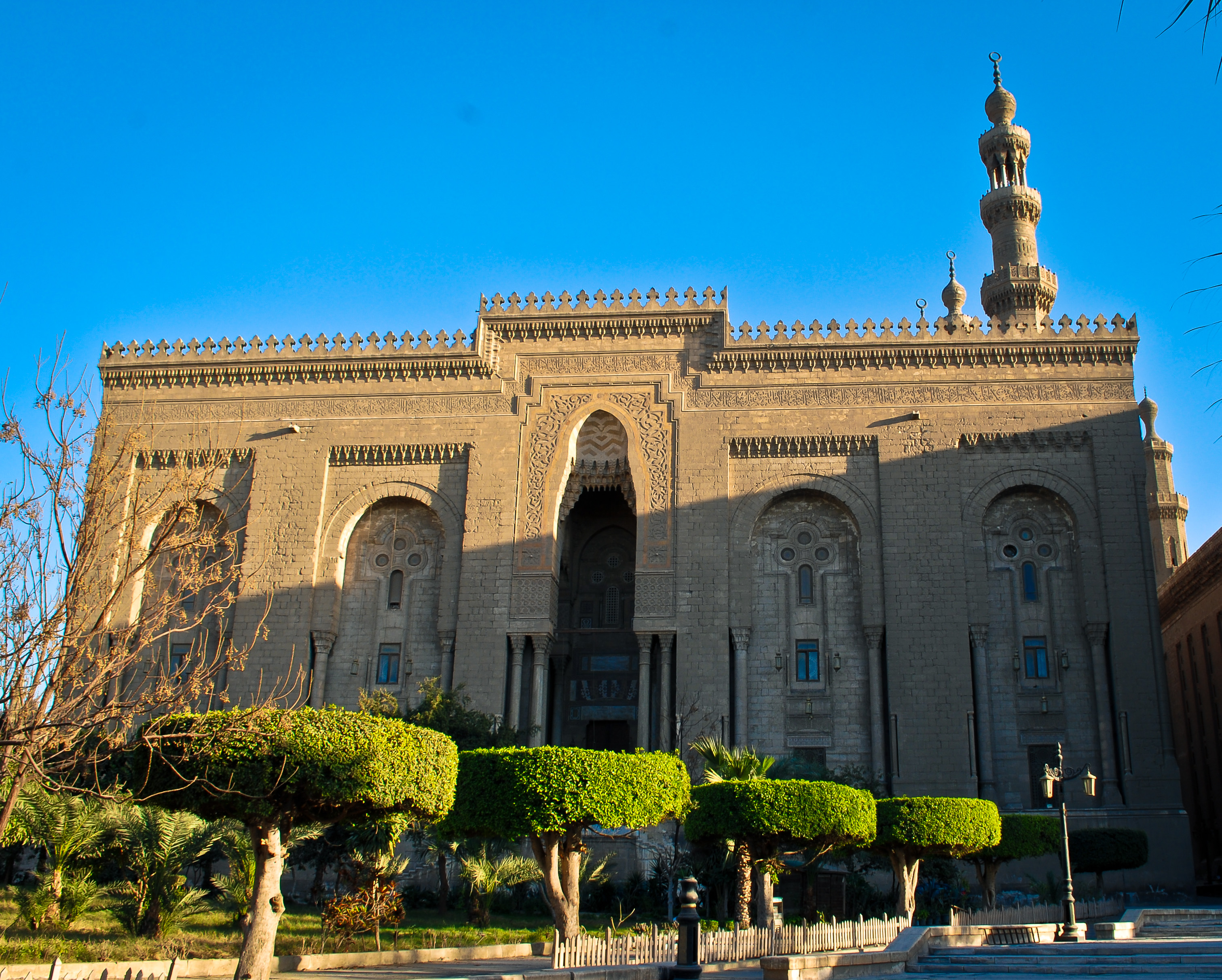 مسجد الرفاعي أحد مساجد القاهرة الأثريّة، شيد عام 1329 هجرية الموافق لعام 1911 ميلادية. سمي بذلك الاسم نسبة إلى (أحمد عزالدين الصياد الرفاعي) أحد أحفاد الإمام أحمد الرفاعي الذي ولد بالعراق وسافر لمصر وتزوج فيها من فتاة من سلالة الملك الأفضل ابن صلاح الدين الايوبي فأعقب منه السيد علي ابي الشباك. ويتميز المسجد التفاصيل الدقيقة في الزخارف على الحوائط الخارجية والعمدان العملاقة عند البوابة الخارجية. وكانت والدة الخديوي إسماعيل هي أكثر من أراد بناء هذا المسجد. وقد استمر بناء هذا المسجد 40 عام. و يحتوي مسجد الرفاعي على العديد من مقابر أكثر أفراد الأسر الحاكمة في مصر لهذا أصرت خوشيار هانم والدة الخيديوي إسماعيل على بنائه وكلفت أكبر مهندسي مصر (في وقته) حسين فهمي باشا بتصميمه. ويوجد بداخل المسجد قبر الملك فاروق الأول، والخديوي إسماعيل ووالدته وقبر شاه إيران رضا بهلوي و محمد رضا بهلوي .